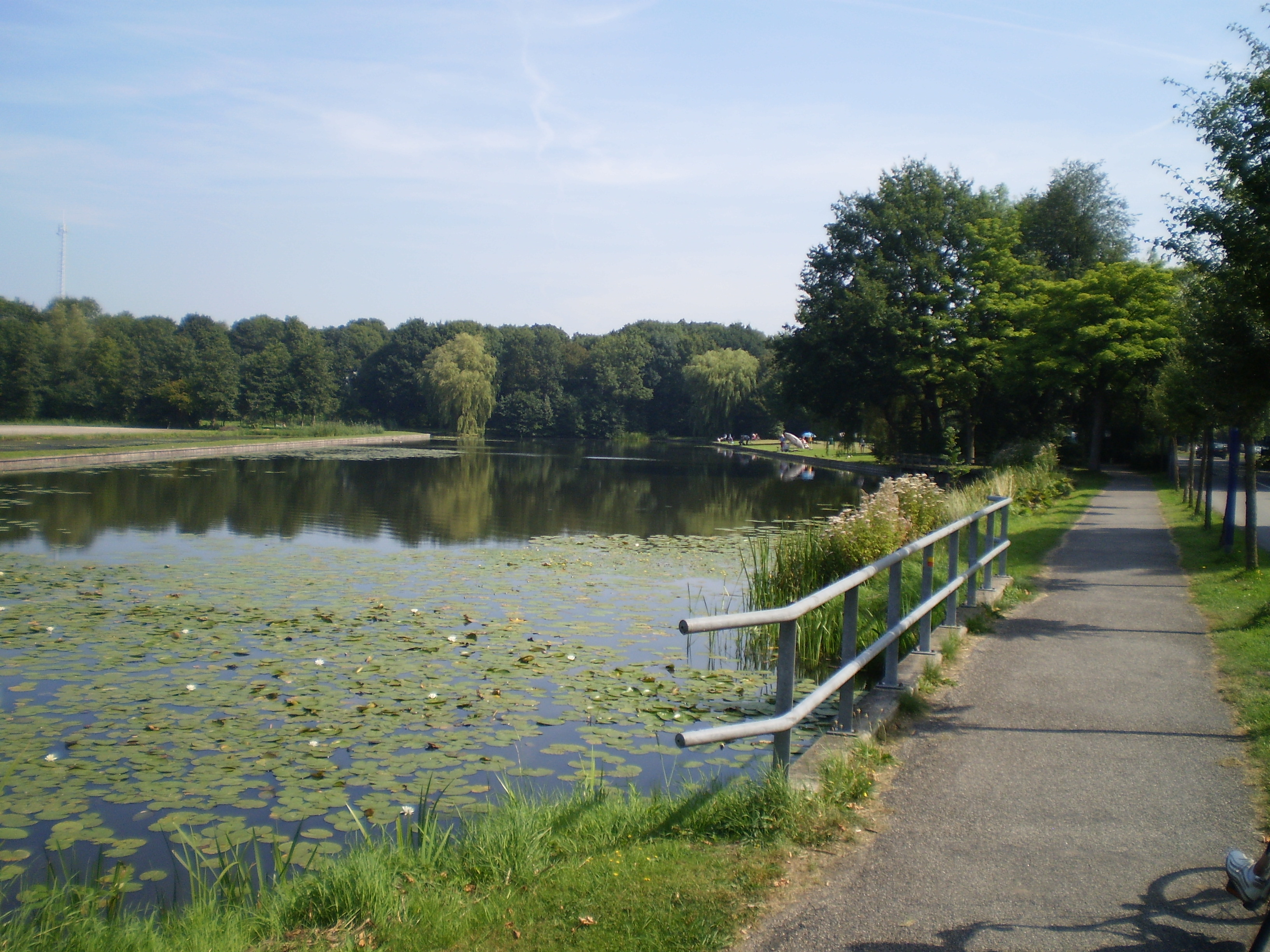 Visvijver bij de Maarsseveense Plassen, Nederlandse gemeente Stichtse Vecht